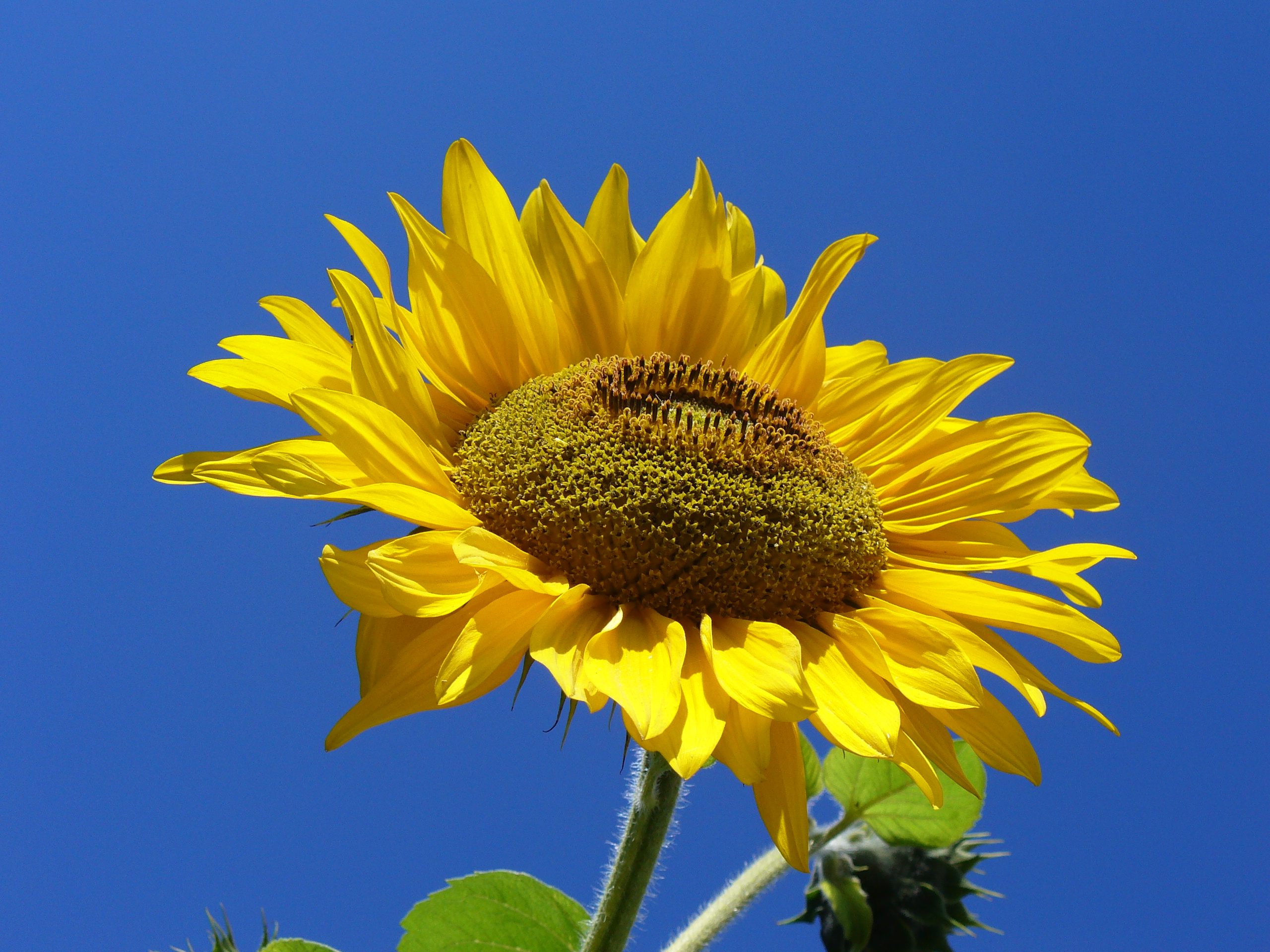 Sunflower (Helianthus annuus L). Słonecznik zwyczajny